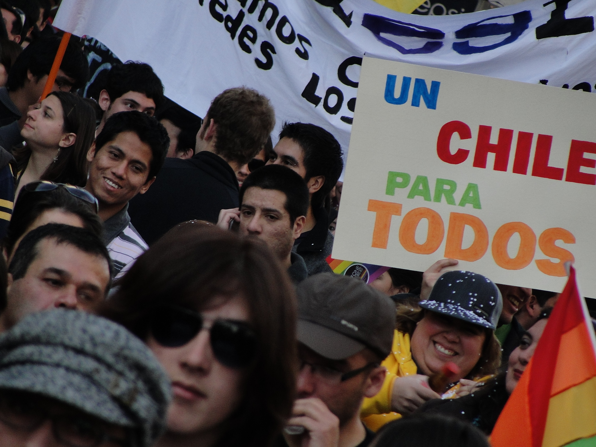 Marcha por la Diversidad Sexual, 25 de junio de 2011 en Santiago, Chile.